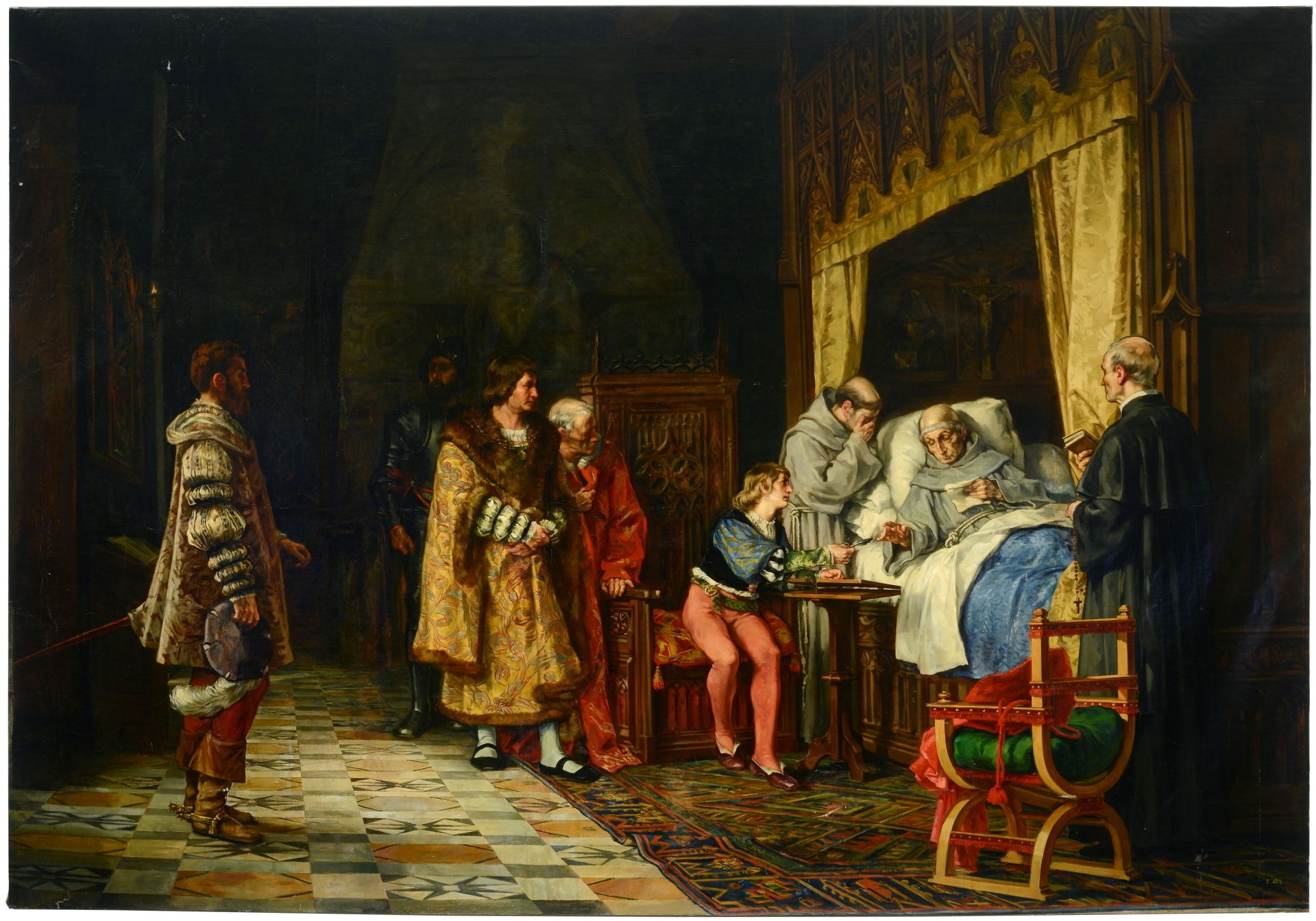 La obra representa al emperador Carlos I de España (1500-1558) y al cardenal Francisco Jiménez de Cisneros.